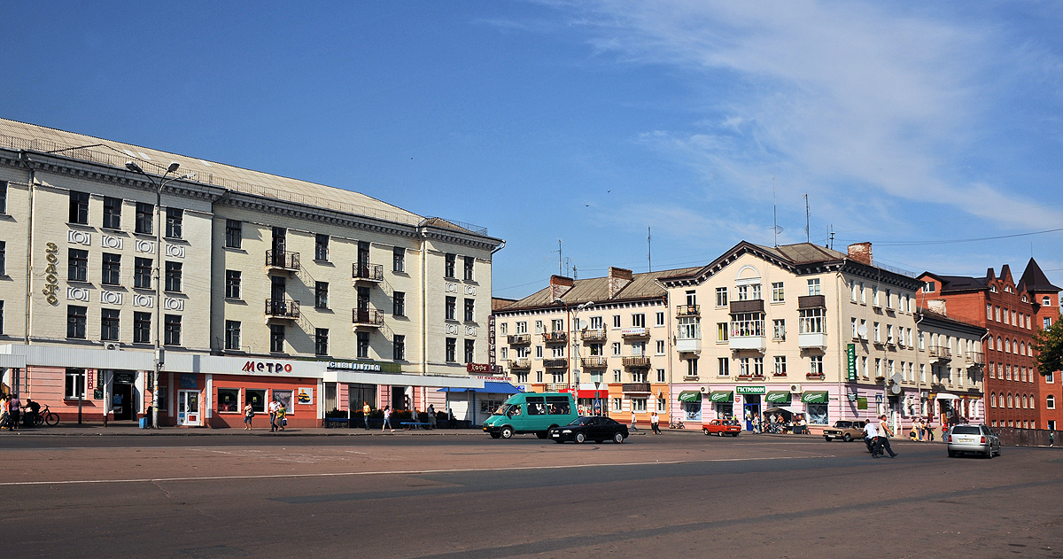 Центральная площадь Нежина